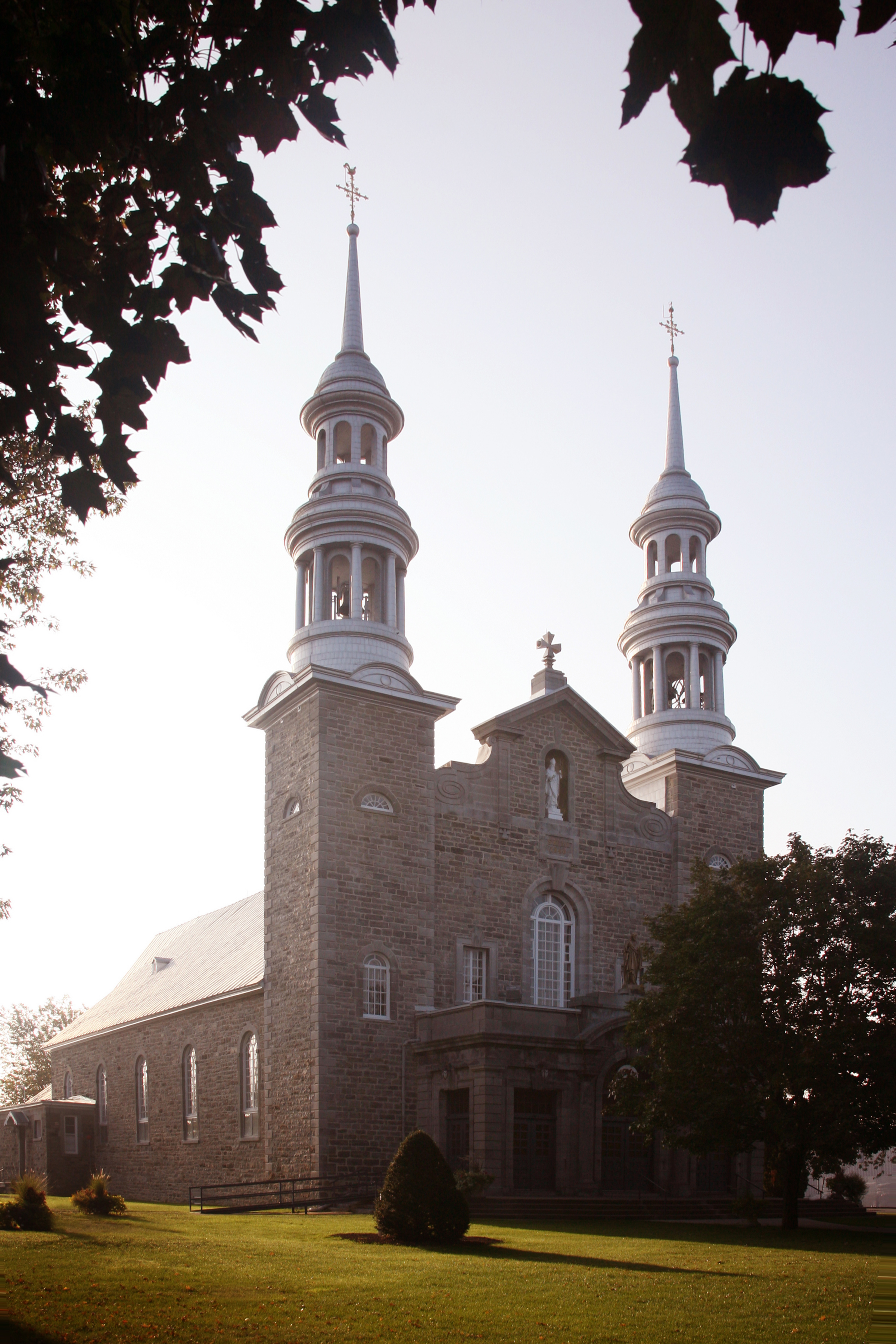 Église de Saint-Rémi située au coeur de la ville